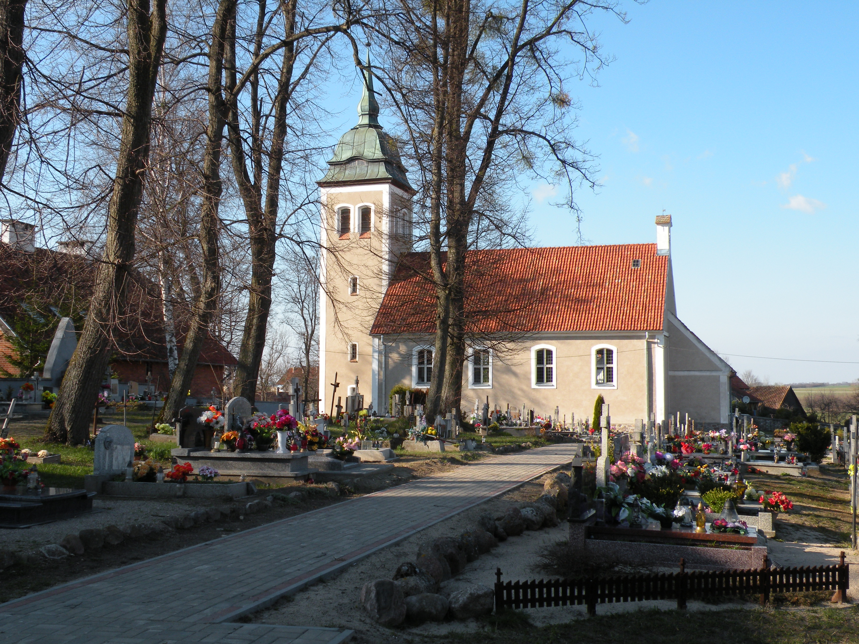 Leginy - kościół parafialny p.w. św. Marii Magdaleny (zabytek nr A-615 i 633 z 10.10.1967)